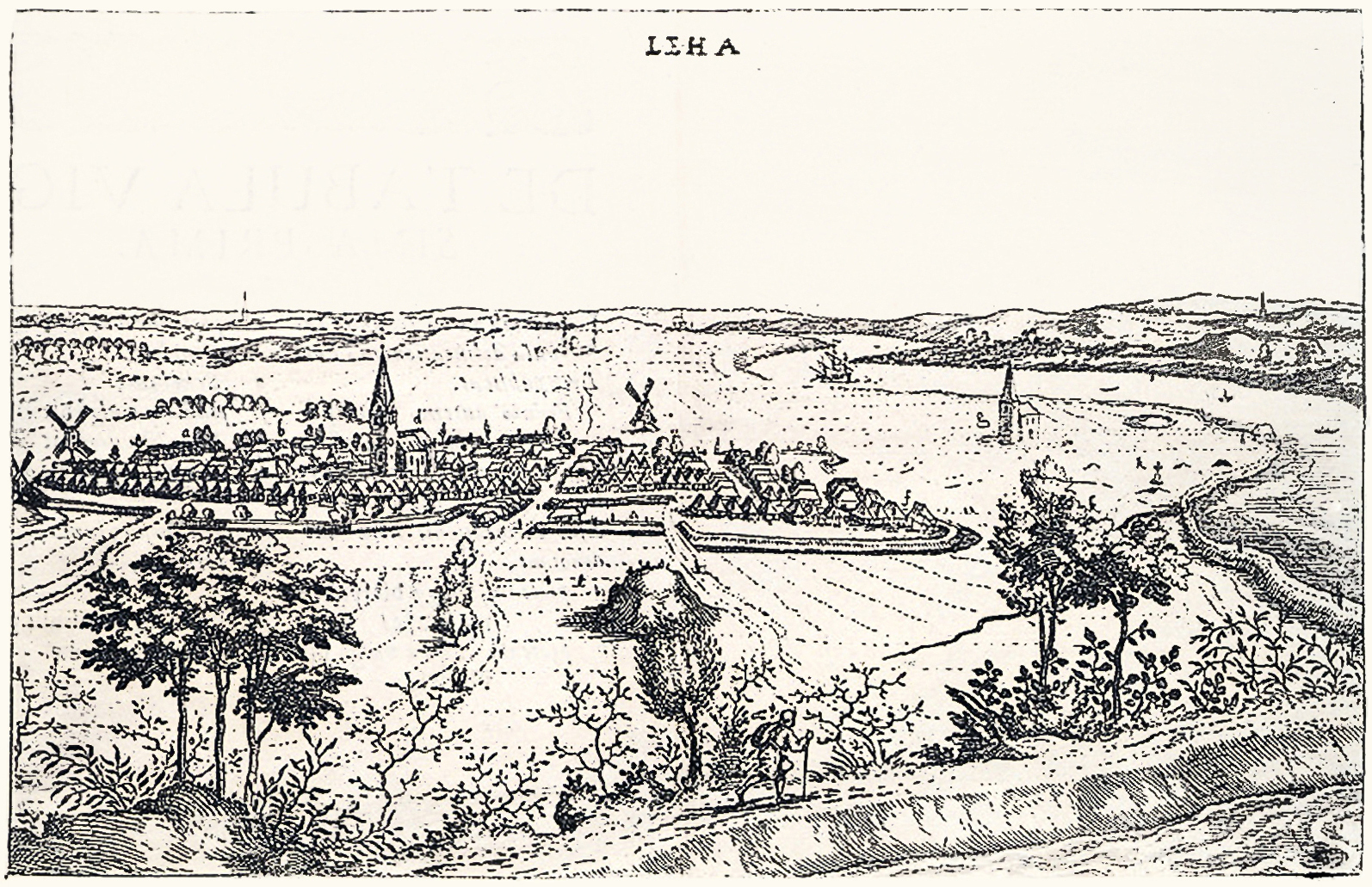 Stich des Fleckens Lehe von 1604